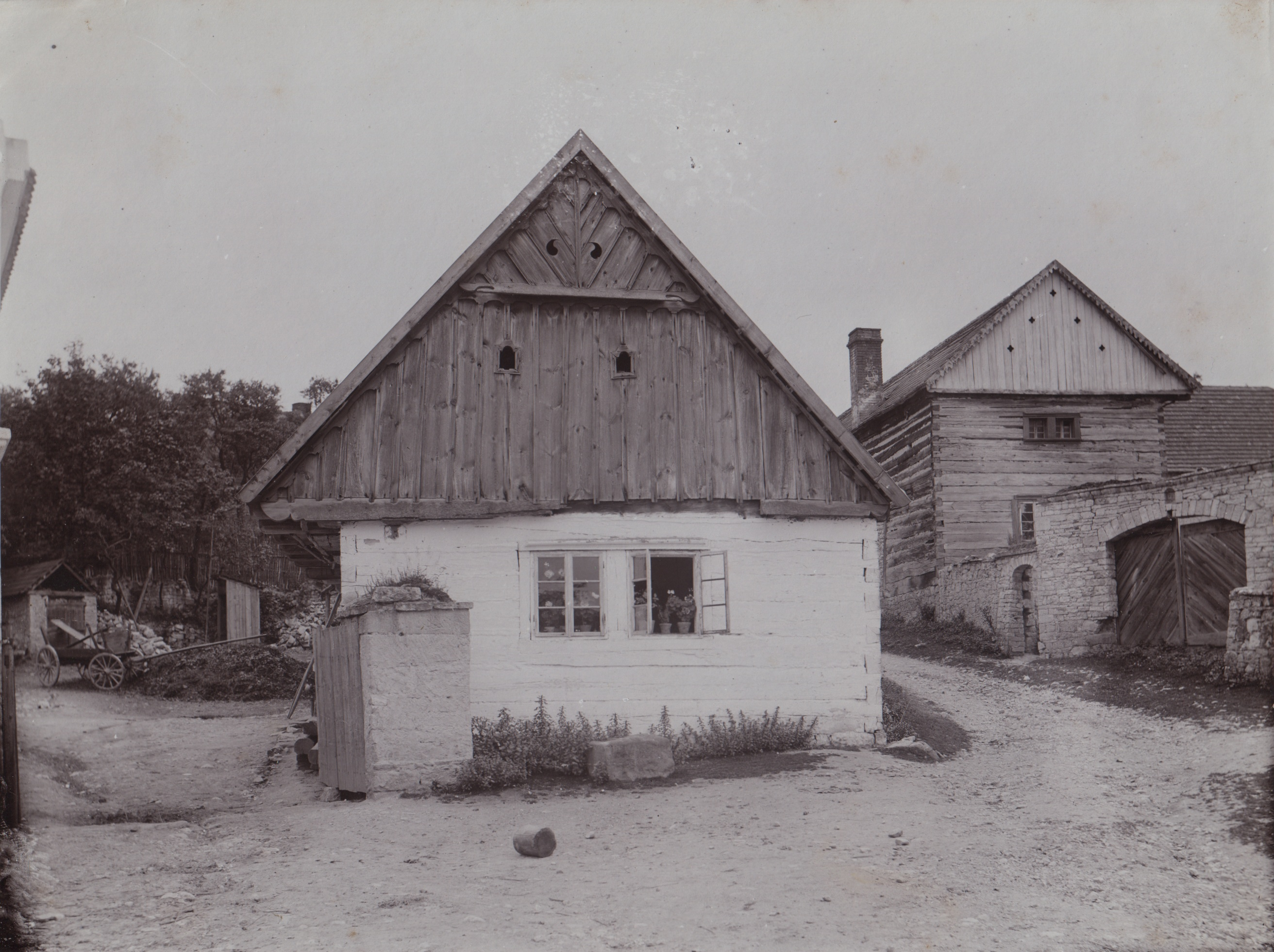 Kalivody (okres Rakovník), roubený dům čp. 5 (zbořeno) a patrový roubený dům u čp. 6. Památkový katalog MonumNet MIS hledat obrázky hledat seznamyWikidata